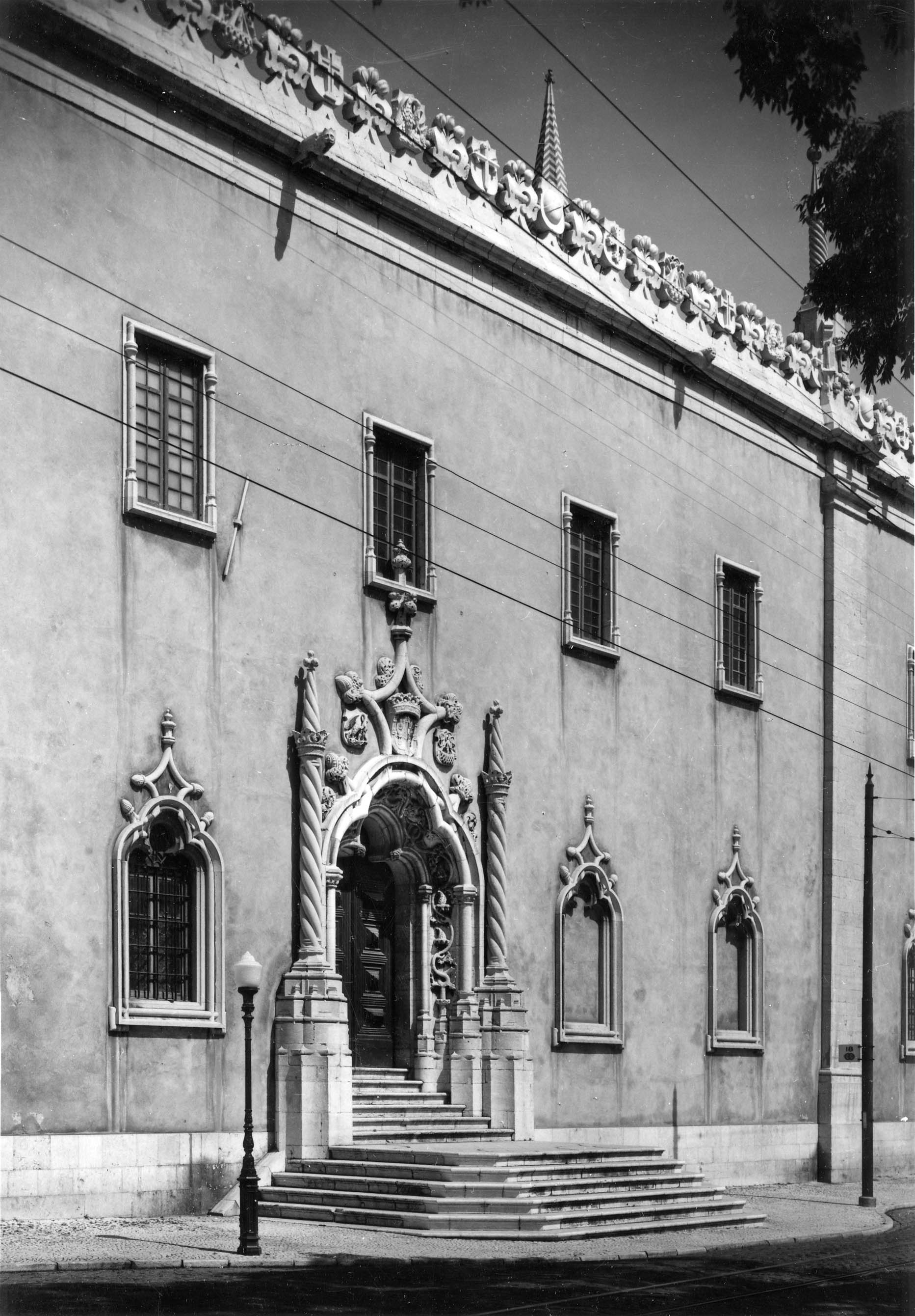 Pórtico, janelas e platibanda da Igreja do Convento da Madre de Deus. Fotógrafo: Mário Novais, 1899-1967. Orientador científico: Mário Tavares Chicó, 1905-1966. Data aproximada de produção da fotografia original: 1954. [CFT015.224.ic]